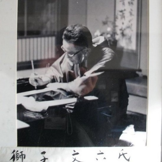 （獅子文六) a Japanese novelist